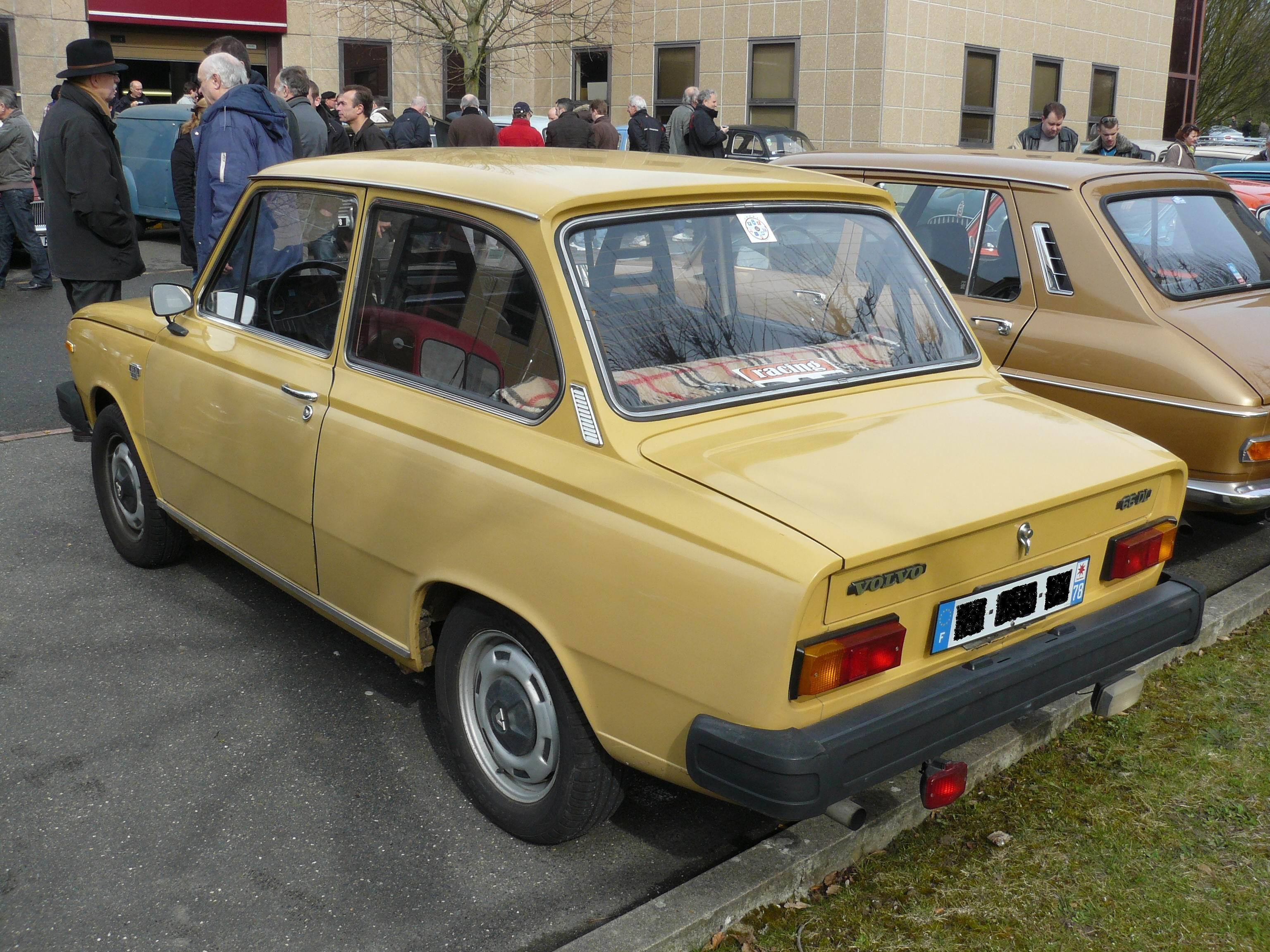 Beynes 2011.